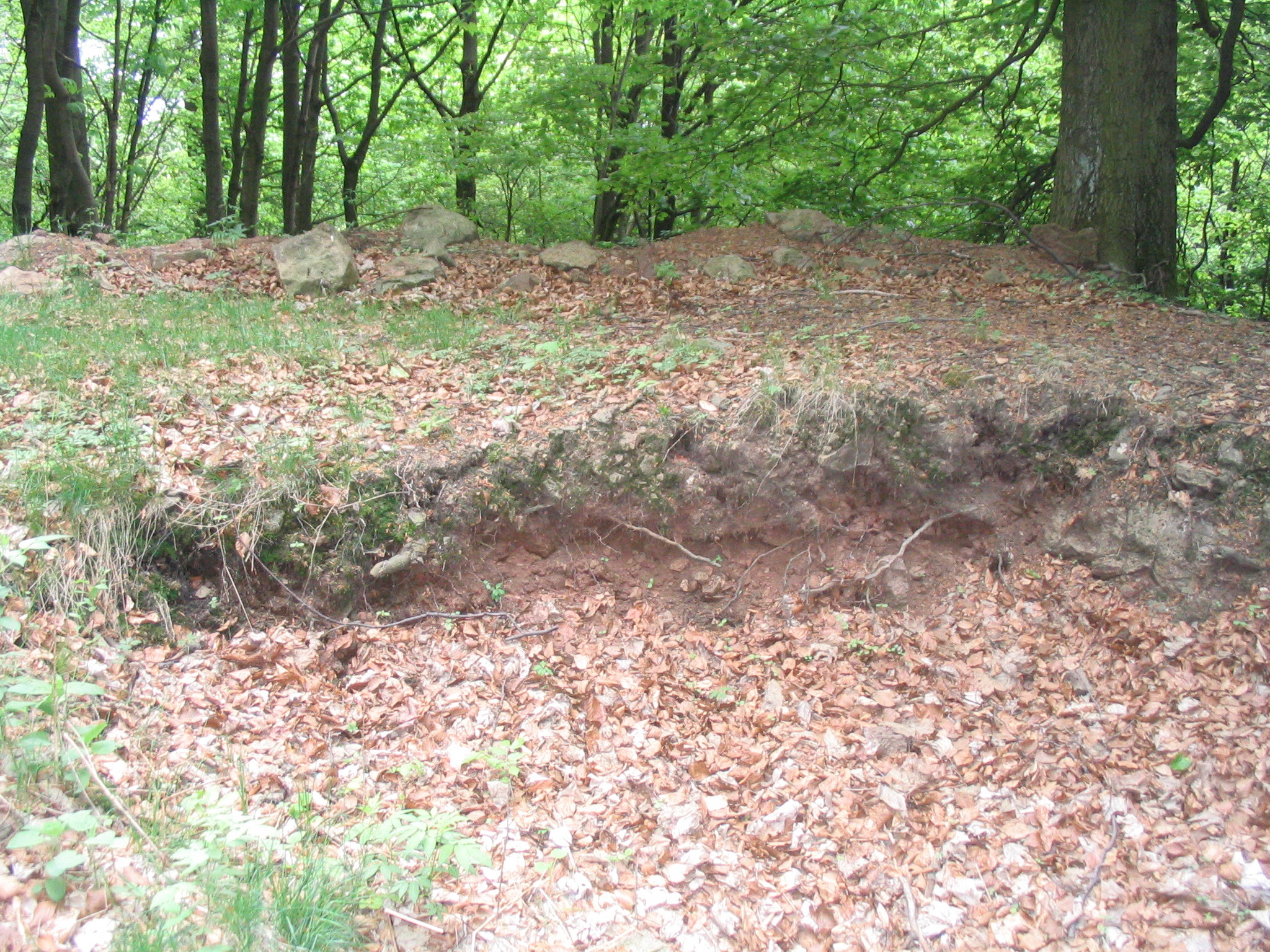 Auf der Naxburg (554 m) bei Freiensteinau im Vogelsberg befand sich eine Burganlage.